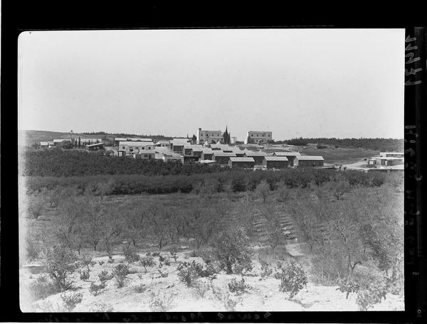 גבעת מיכאל, נס ציונה, מראה כללי של הקיבוץ המיוחד, בתי קבוצת ההכשרה